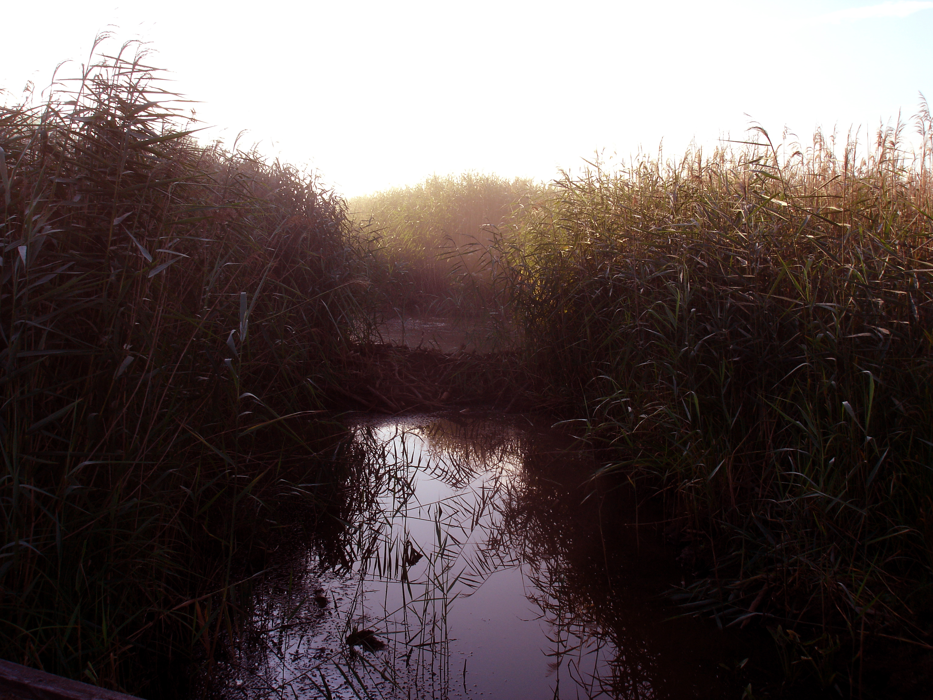 Kanaal Zaborowski, Kampinos Nationaal Park, Polen